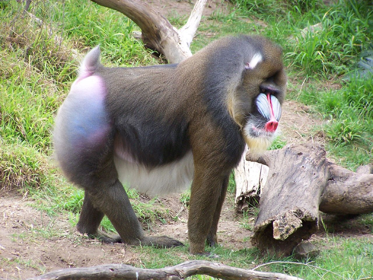 mandrill at san francisco zoo